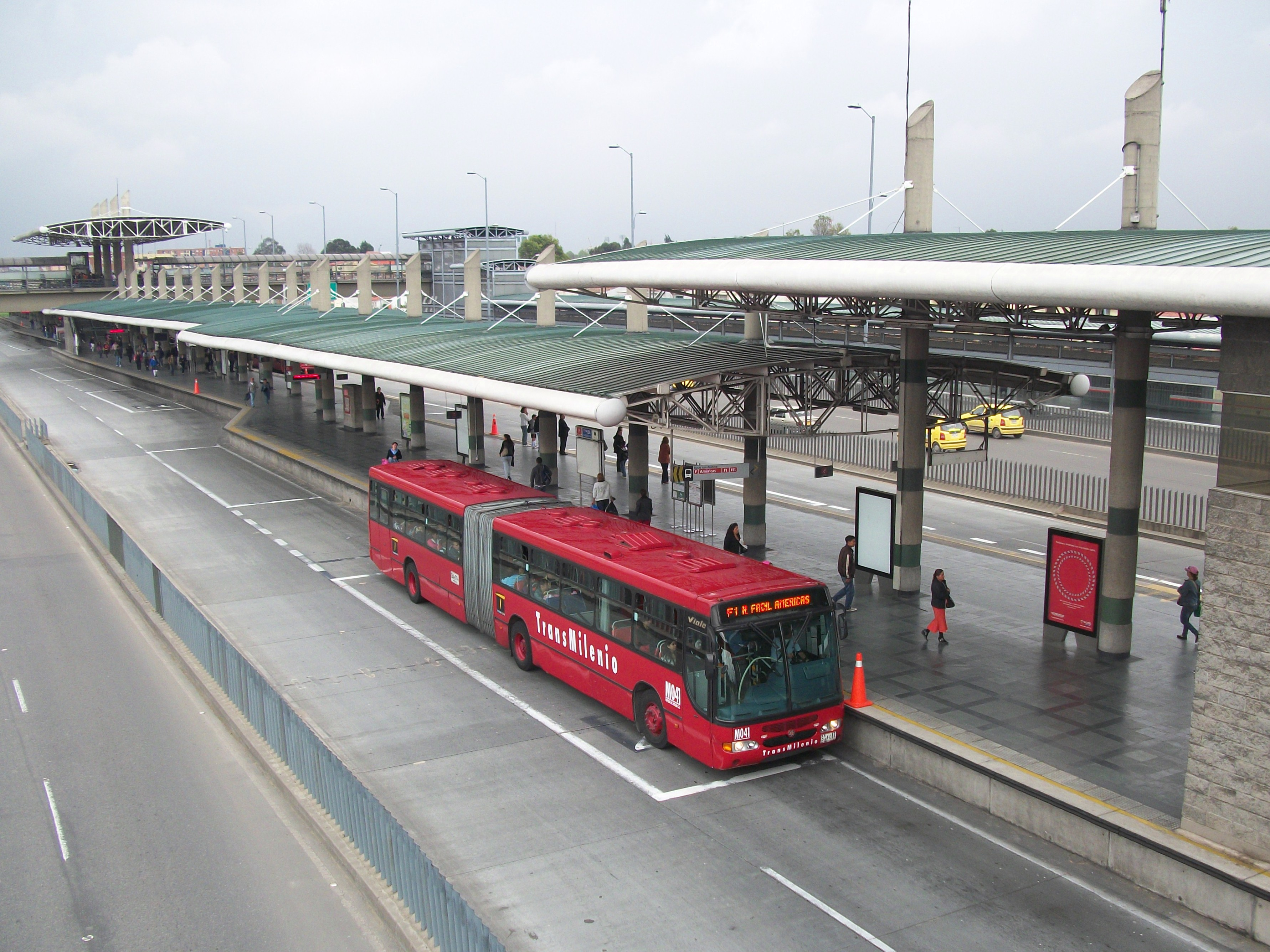 Estación Banderas de TransMilenio.